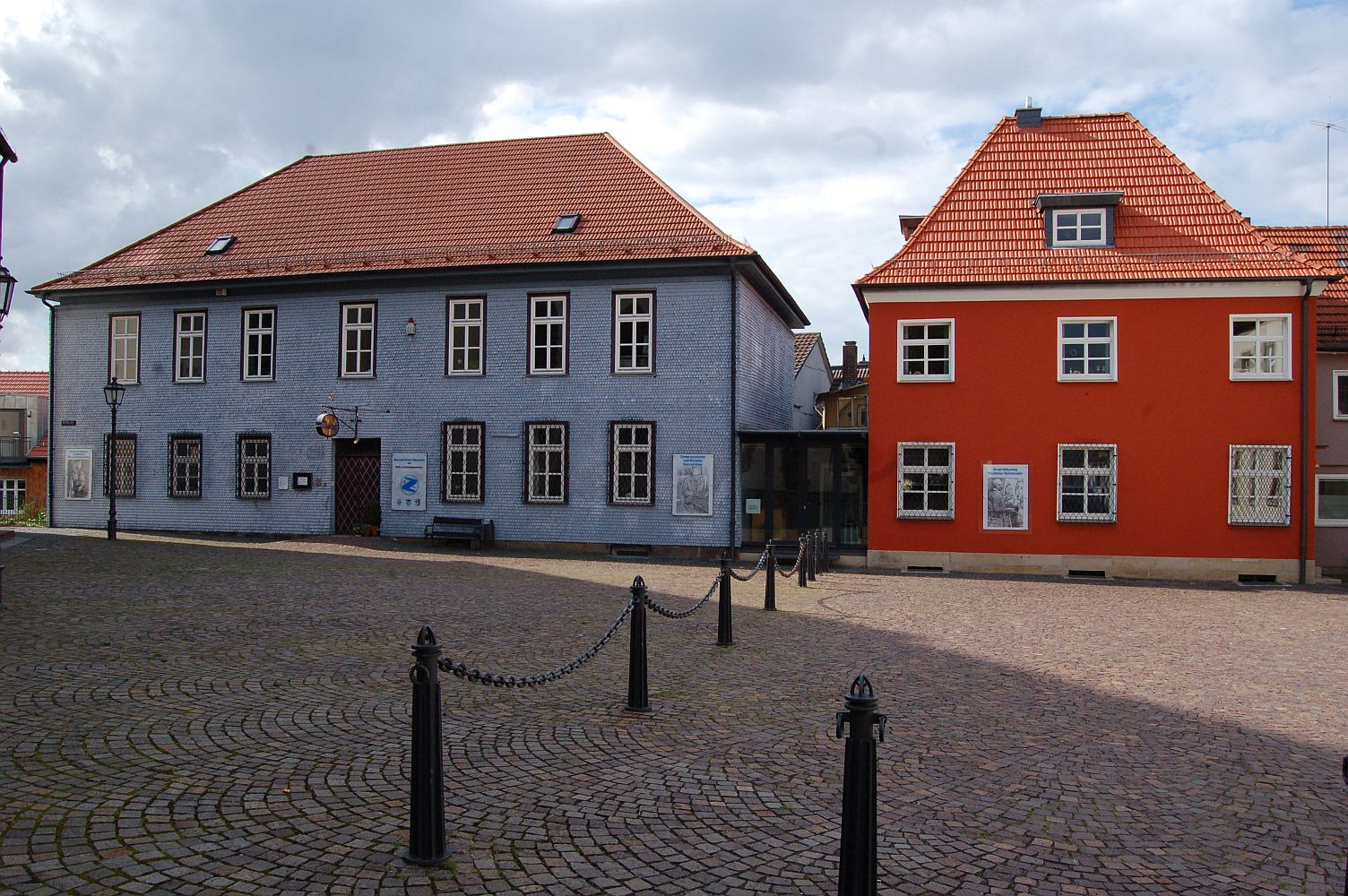 Museum Hauptgebäude in der alten Stadtschule